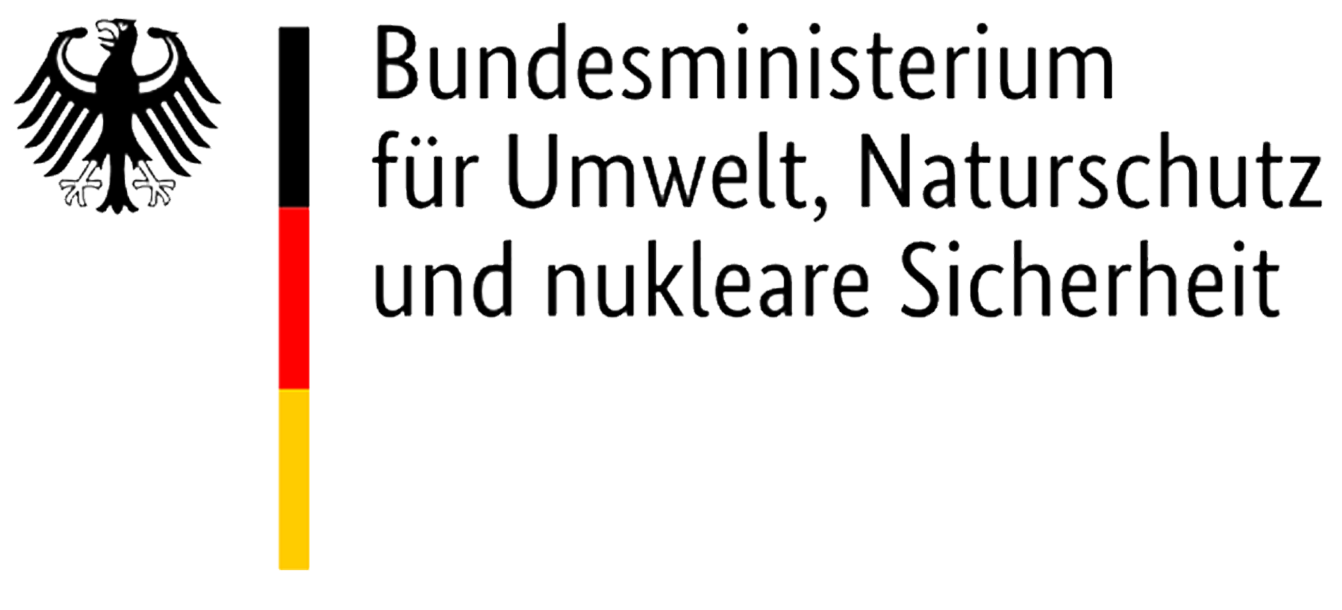 Logo des Bundesministeriums für Umwelt, Naturschutz und nukleare Sicherheit